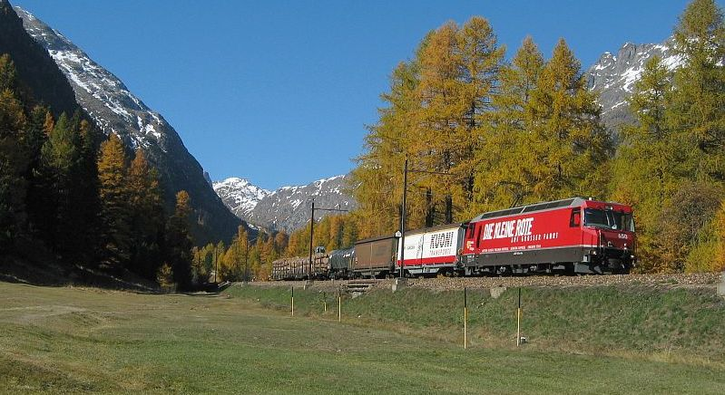 Zug 5537 der Rhätischen Bahn bei Bever (CH-GR)